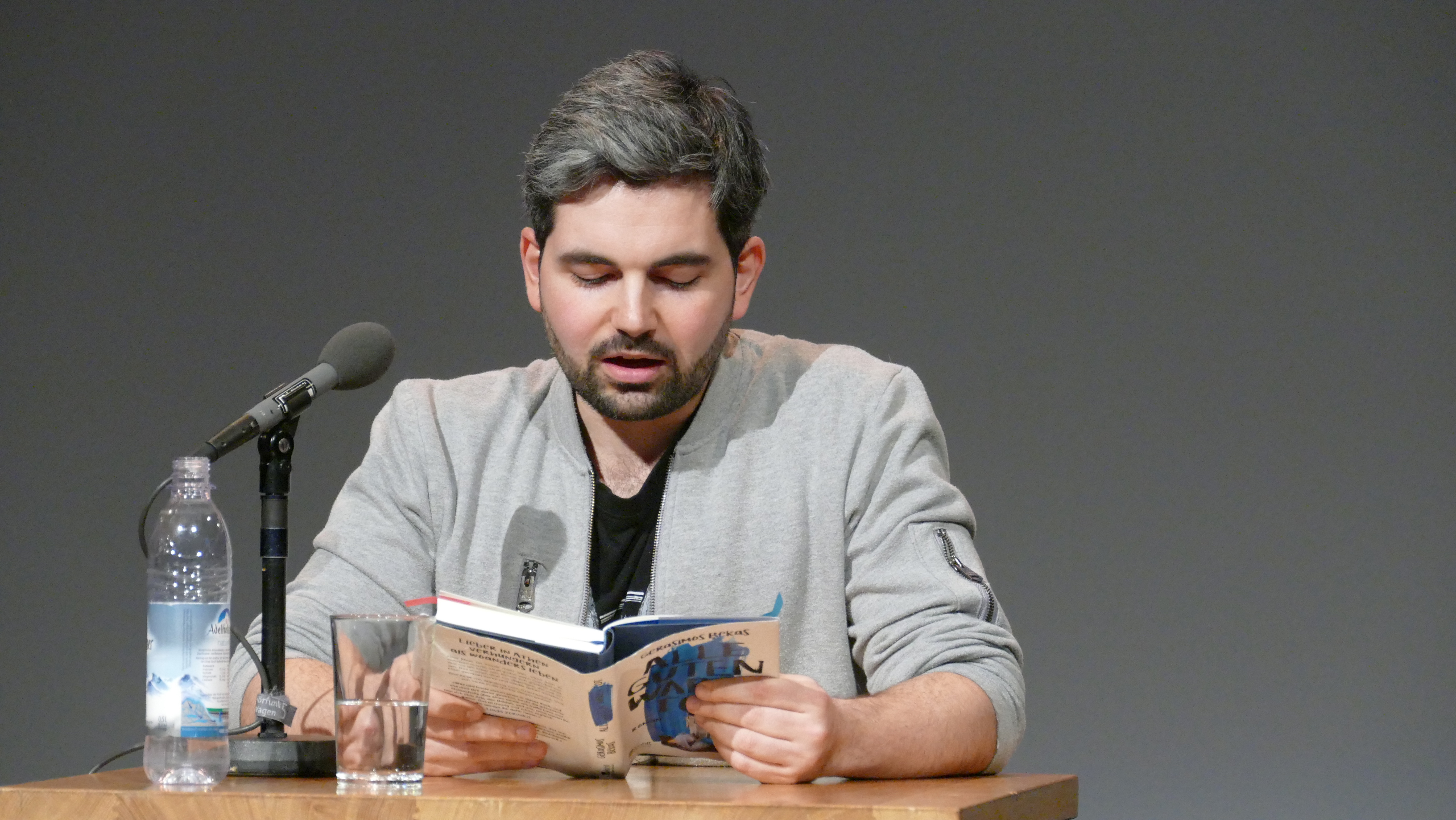 Gerasimos Bekas liest bei den Wortspielen 2019 in München aus seinem Romandebüt "Alle Guten waren tot" (Rowohlt Verlag)